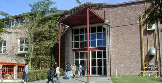 Acceso a la Universidad Nacional de Quilmes